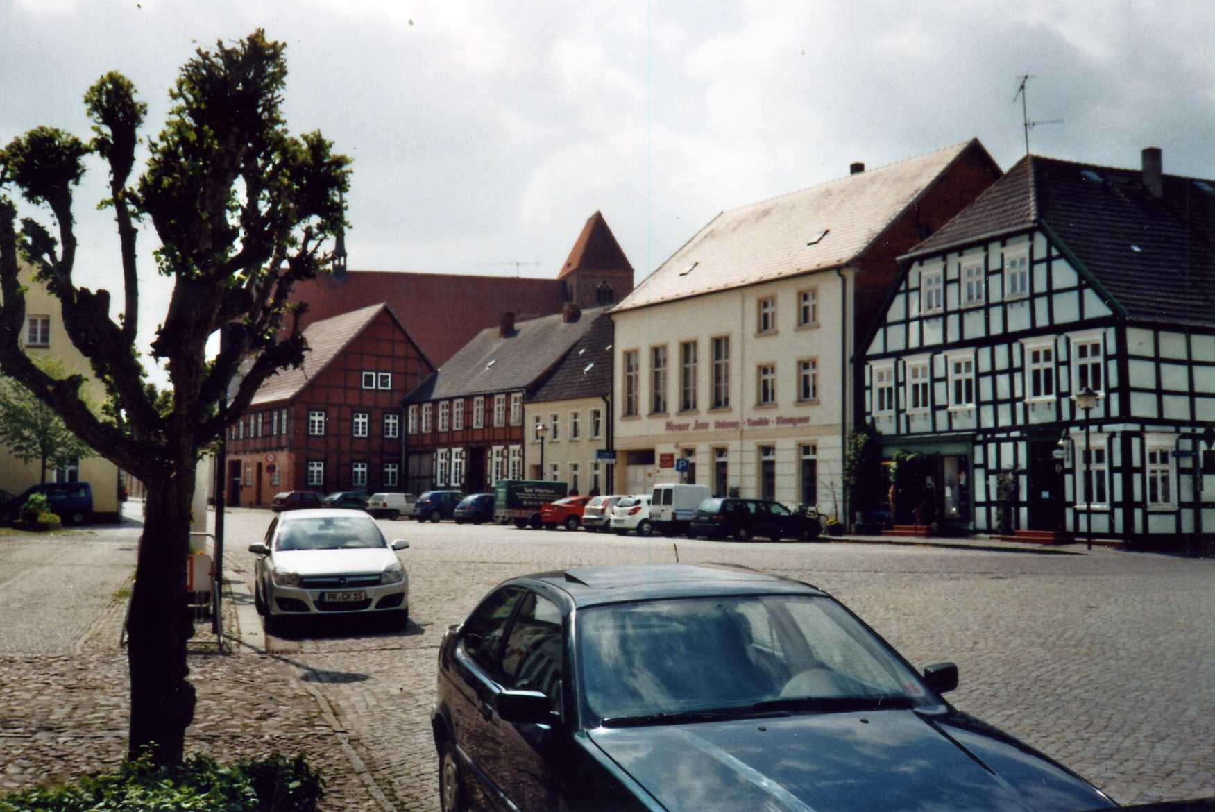 Markplatz Werben mit Johanniskirche